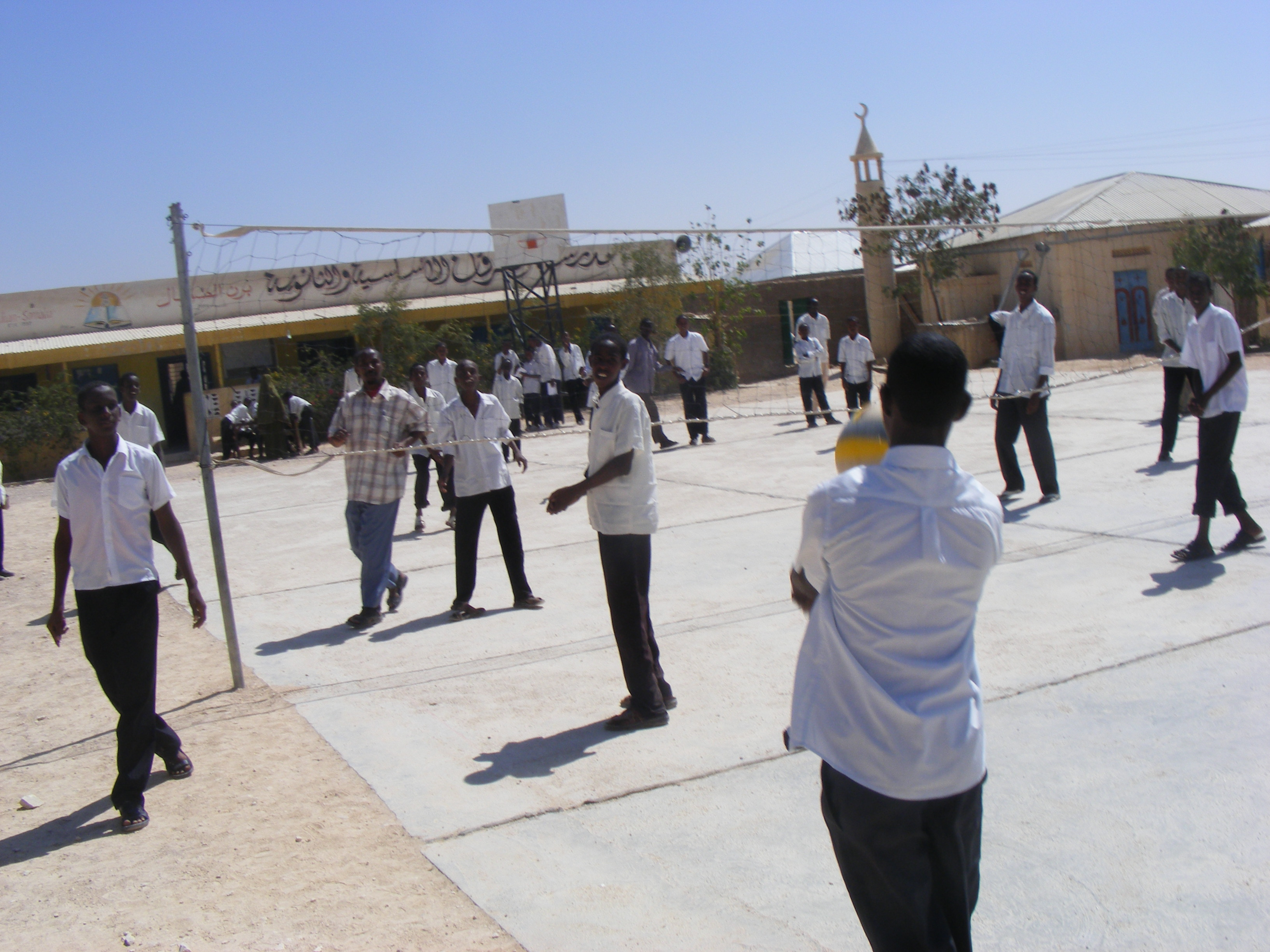 Alfurqan High School in Badhan